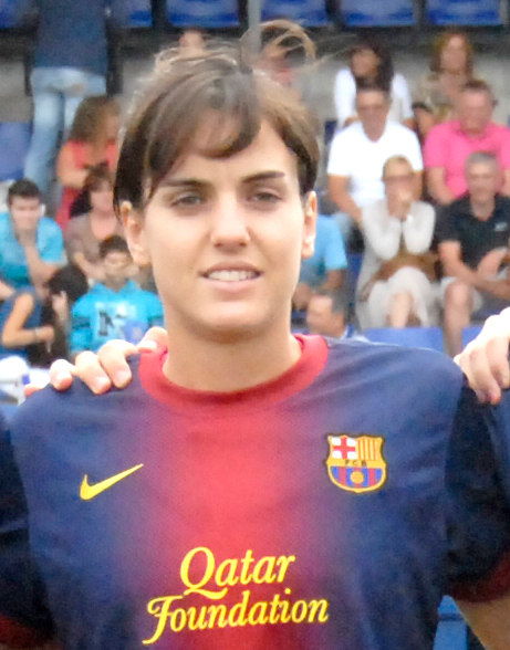 Melanie Serrano